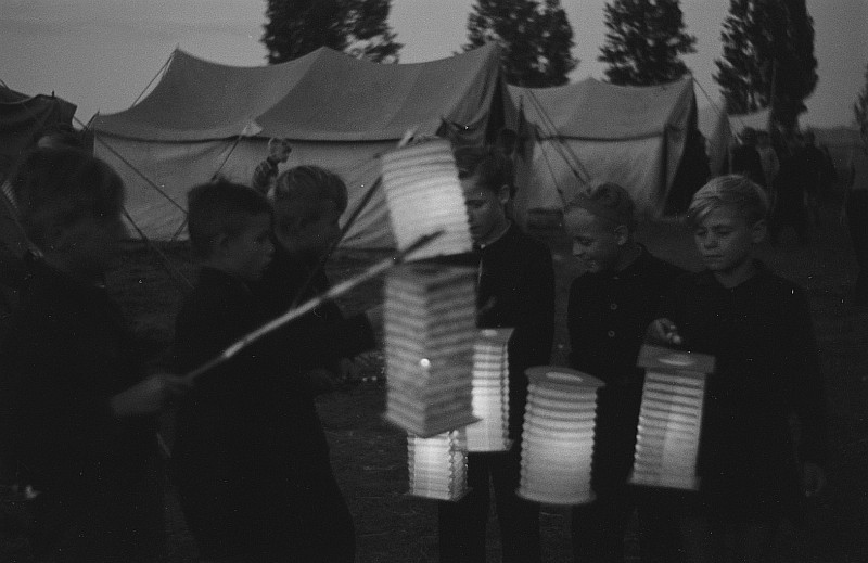 Original image description from the Deutsche Fotothek Jungen mit Lampions